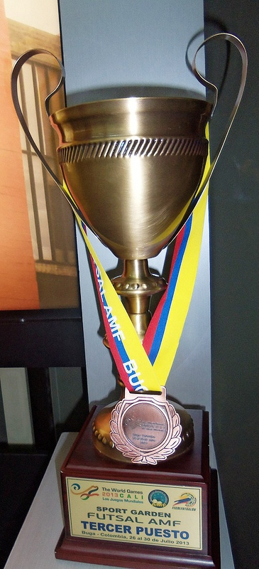 Troféu World Games de futsal (AMF), terceiro lugar da Seleção Brasileira (CNFS) em 2013.